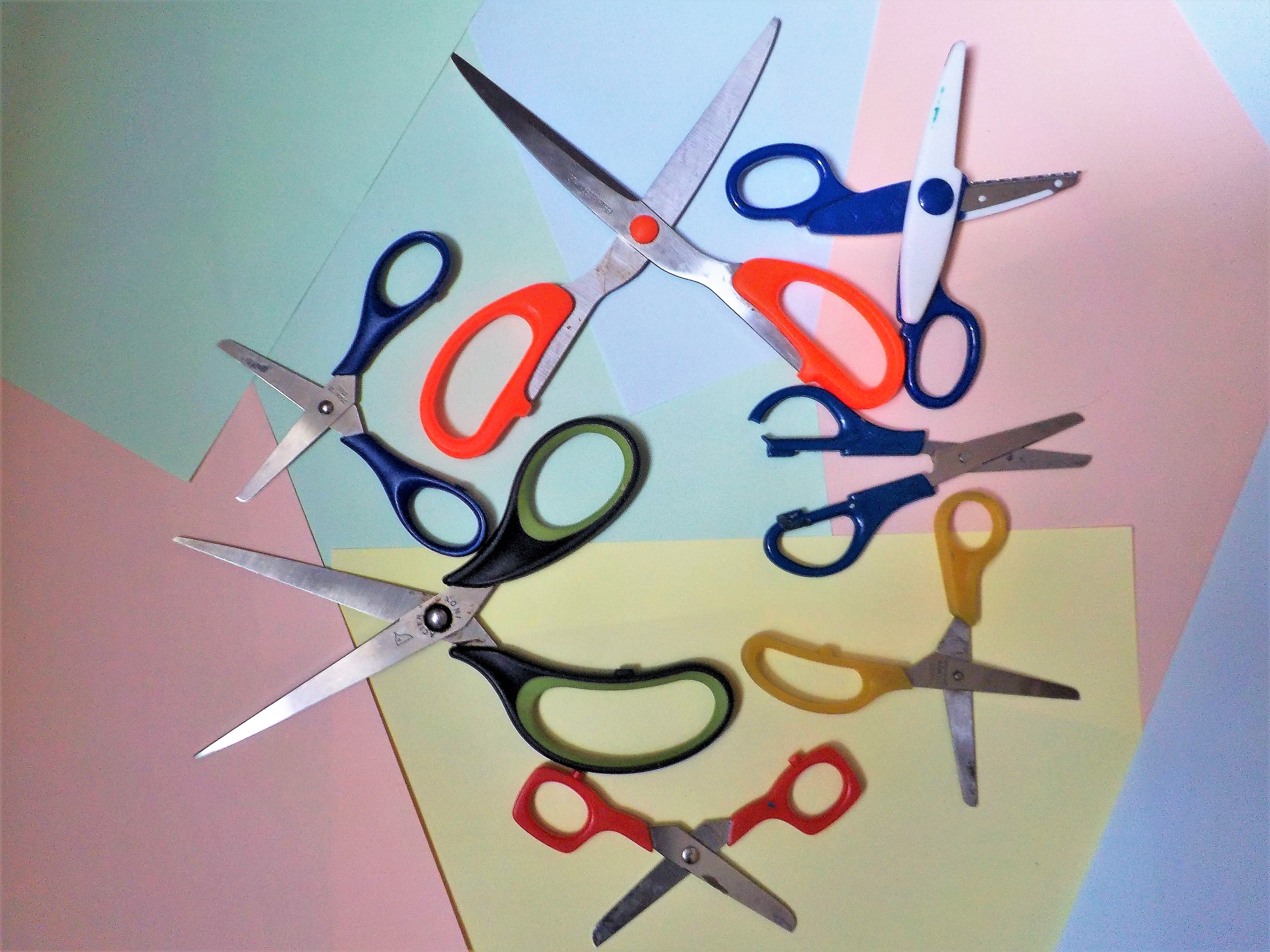 Differenti tipi di forbici e lame: per cucina, per cucito e per tagliare la carta.